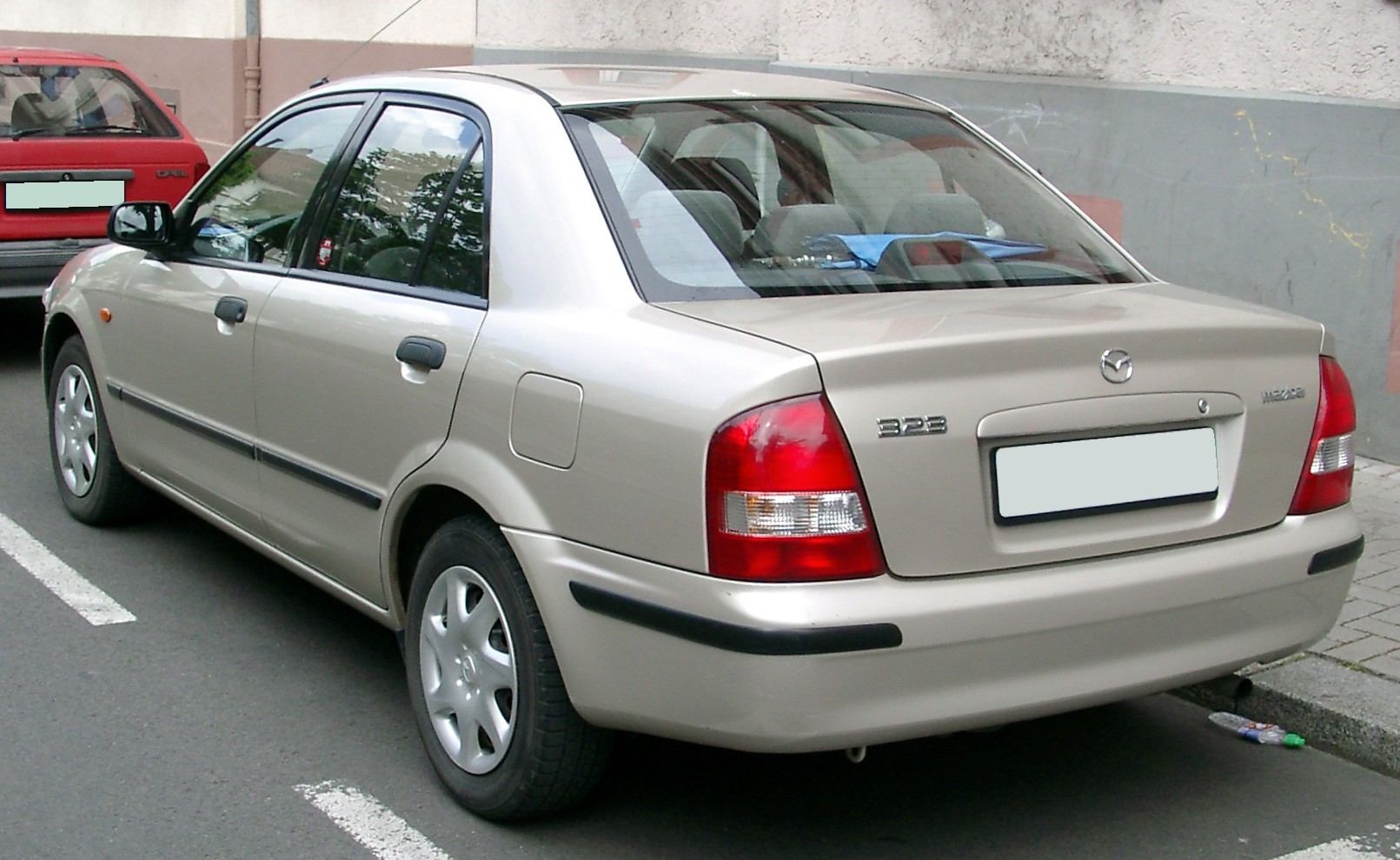 Mazda 323 BJ